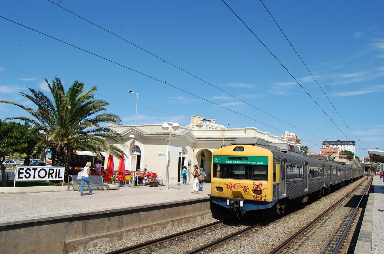 Estoril Station